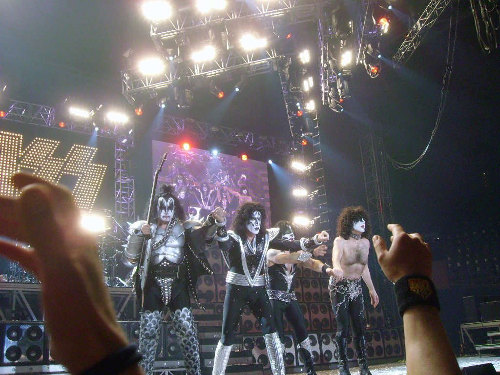 Kiss